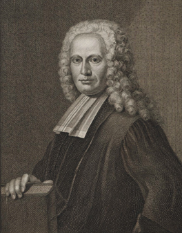 Portret van de hoogleraar theologie Herman(nus) Venema (1697-1787)